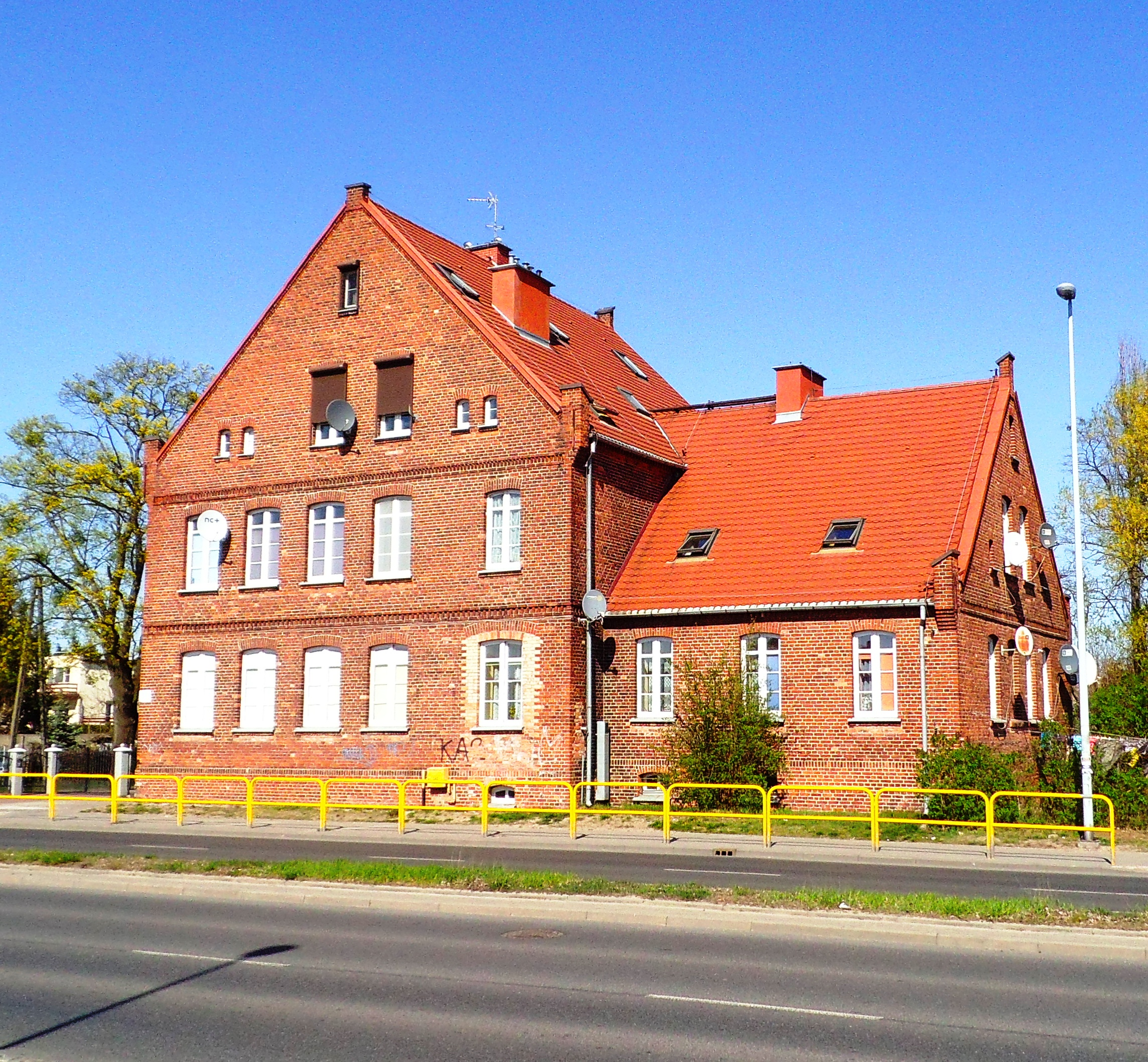 Dawna Szkoła Podstawowa nr 9 w Toruniu